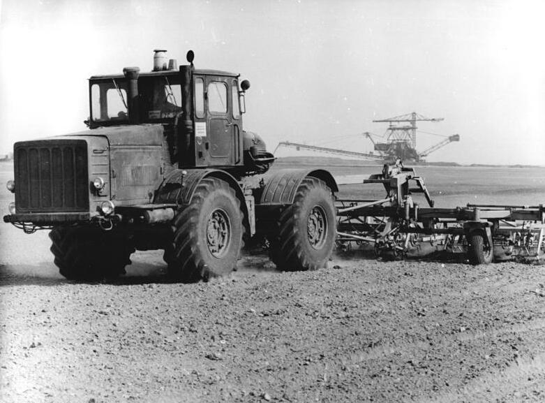 Lohsa, Tagebau, Rekultivierung ADNZB-Link-10.11.86-Bez. Cottbus: Wiederurbarmachung von Bergbaugelände. Die Wiederurbarmachung durch den Bergbau nähert sich dem Ende, wenn die Testsaat - wie hier im Tagebau Lohsa III des Braunkohlenkombinates Senftenberg - ausgebracht wird. Mitarbeiter der Meliorationsgenossenschaft Hoyerswerda bereiten mit Hilfe von Kombinationsgeräten ein feinkrümeliges Saatbett vor. Die Meliorationsgenossenschaft gehört zu den Kooperationspartnern des Braunkohlenwerkes "Glückauf" des Braunkohlenkombinats Senftenberg.